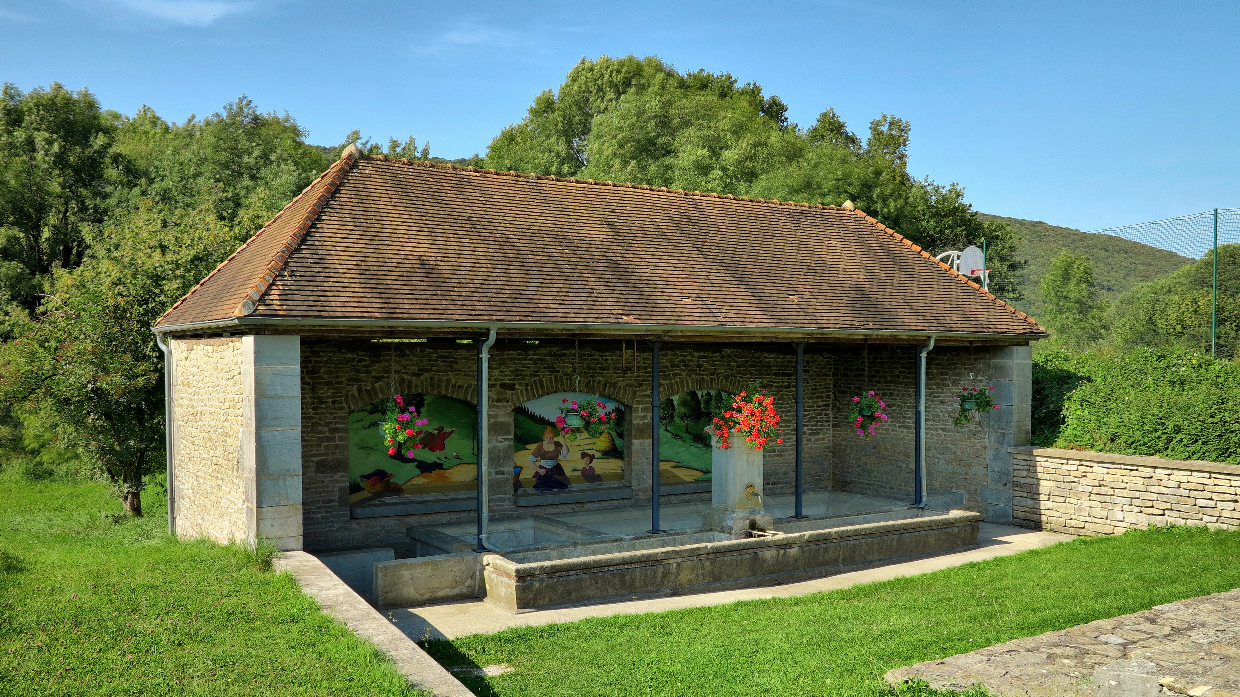 Le lavoir-abreuvoir